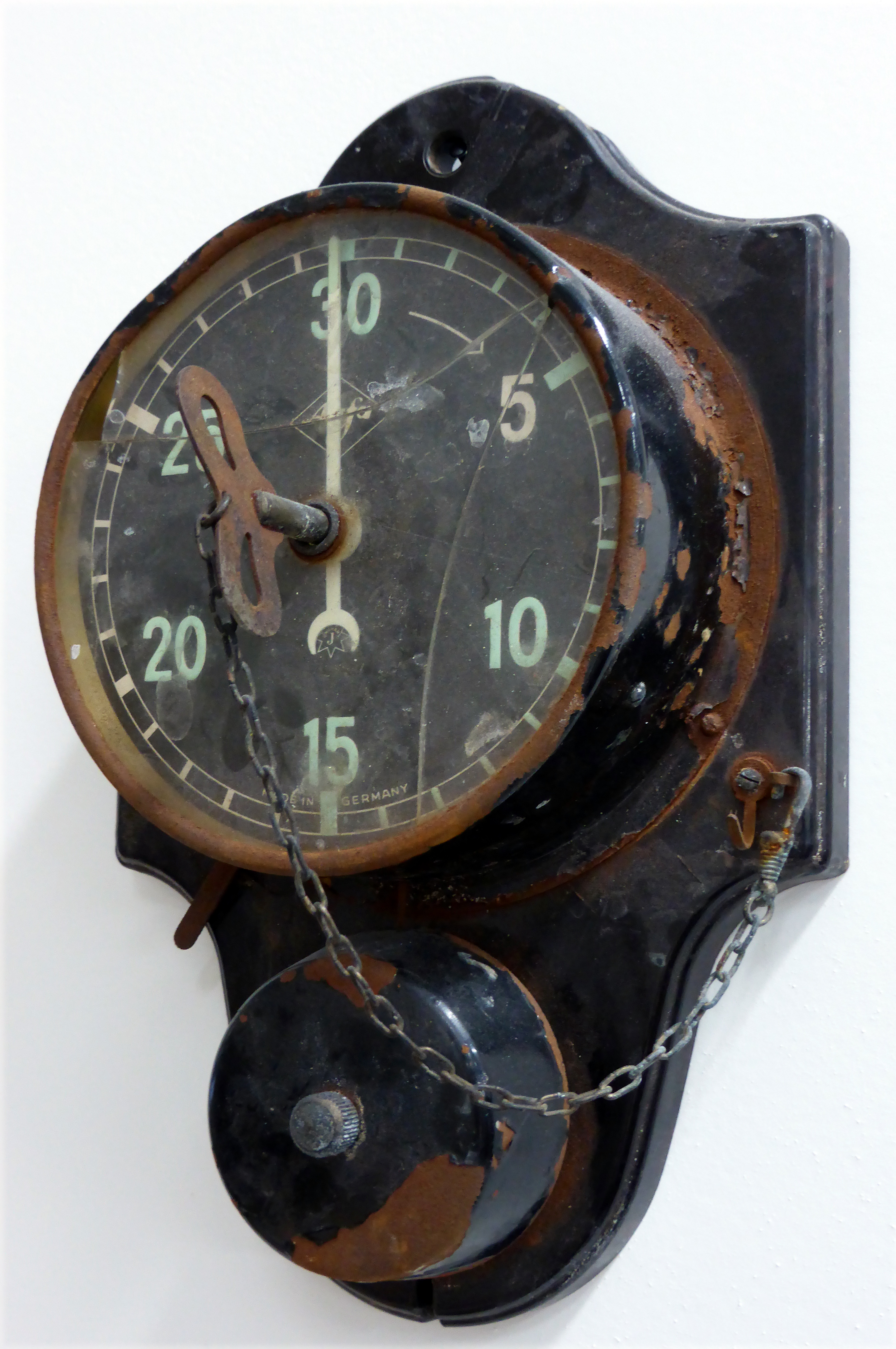 Mechanischer Kurzzeitwecker im Restaurierungs- und Digitalisierungszentrum des Historischen Archivs der Stadt Köln.